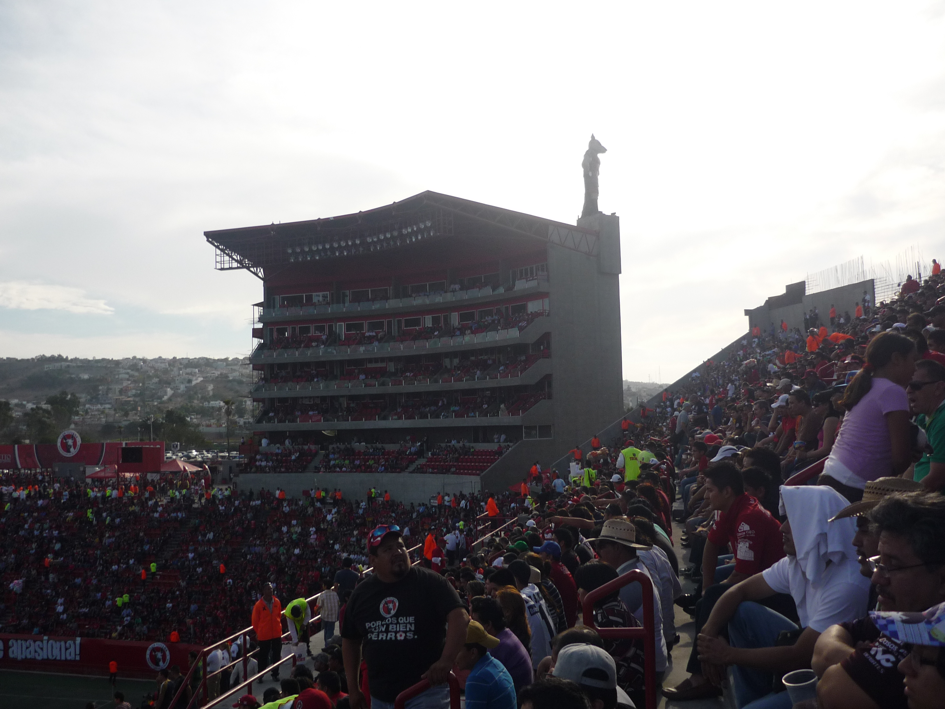 estadiocaliente